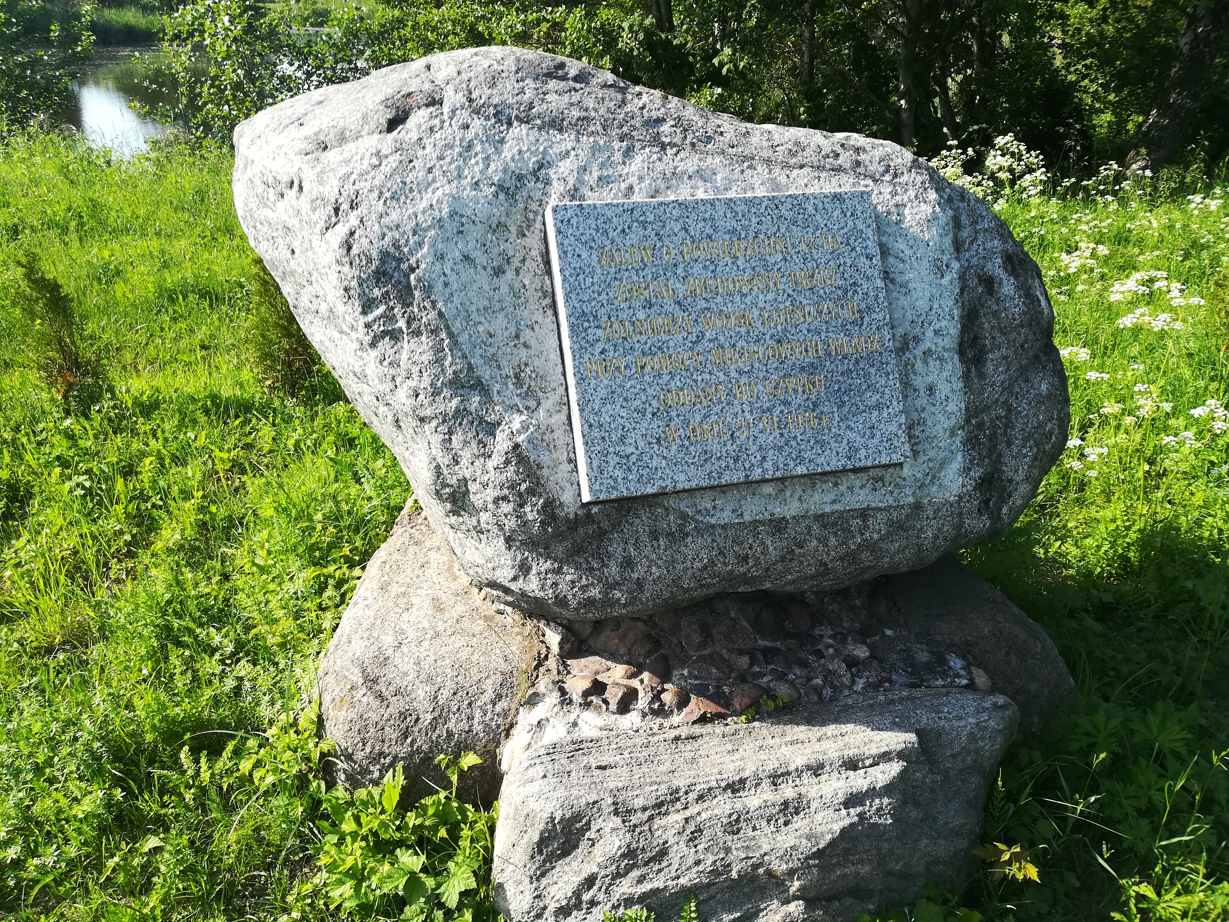 Zalew Leźnica w gm. Parzęczew. Głaz pamiątkowy ku czci budowniczych.